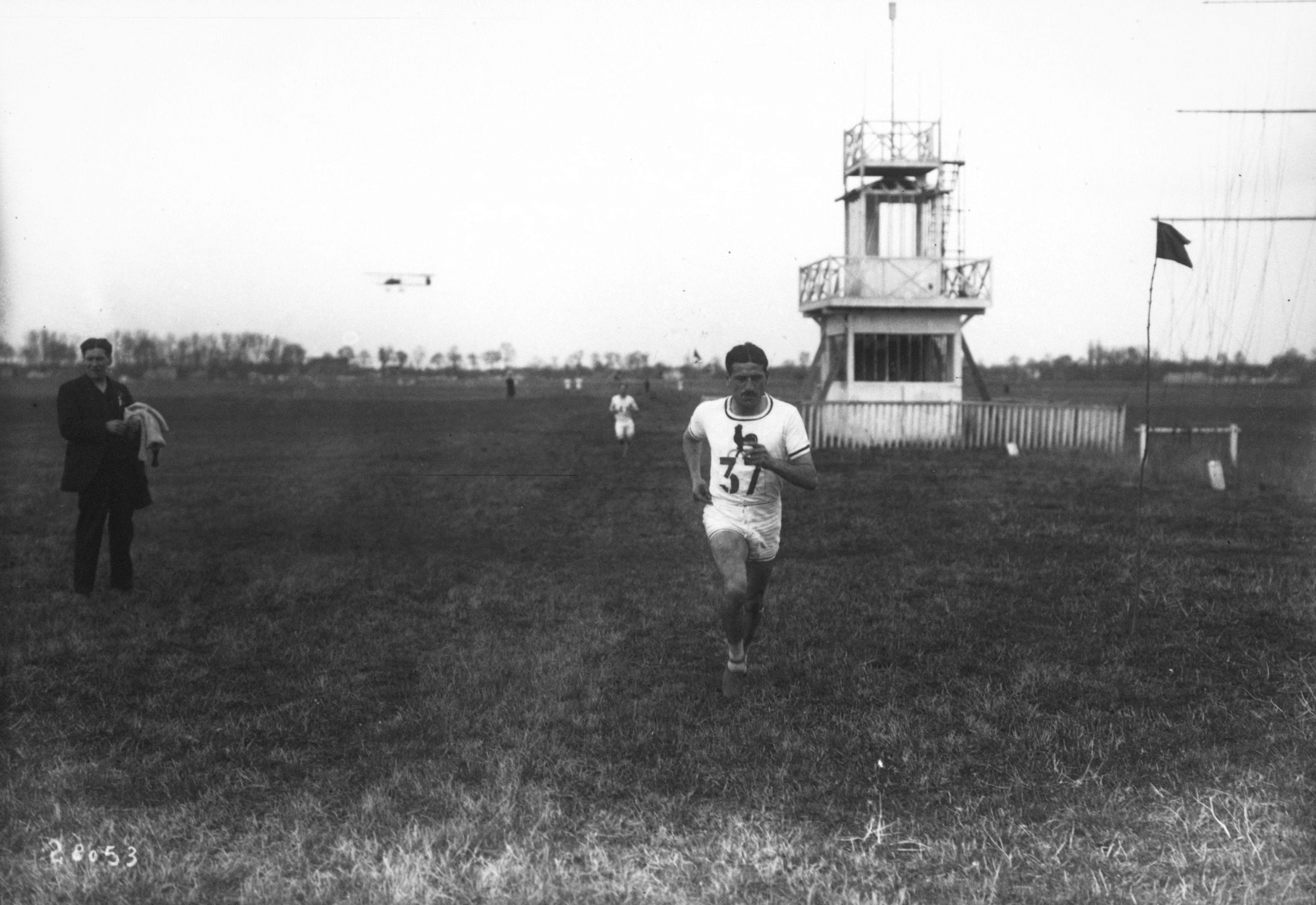 24-03-13, Juvisy, cross des cinq nations : Jean Bouin du Club athlétique de la Société générale, représentant de l'équipe de France, sur le terrain de l'aérodrome de Juvisy.